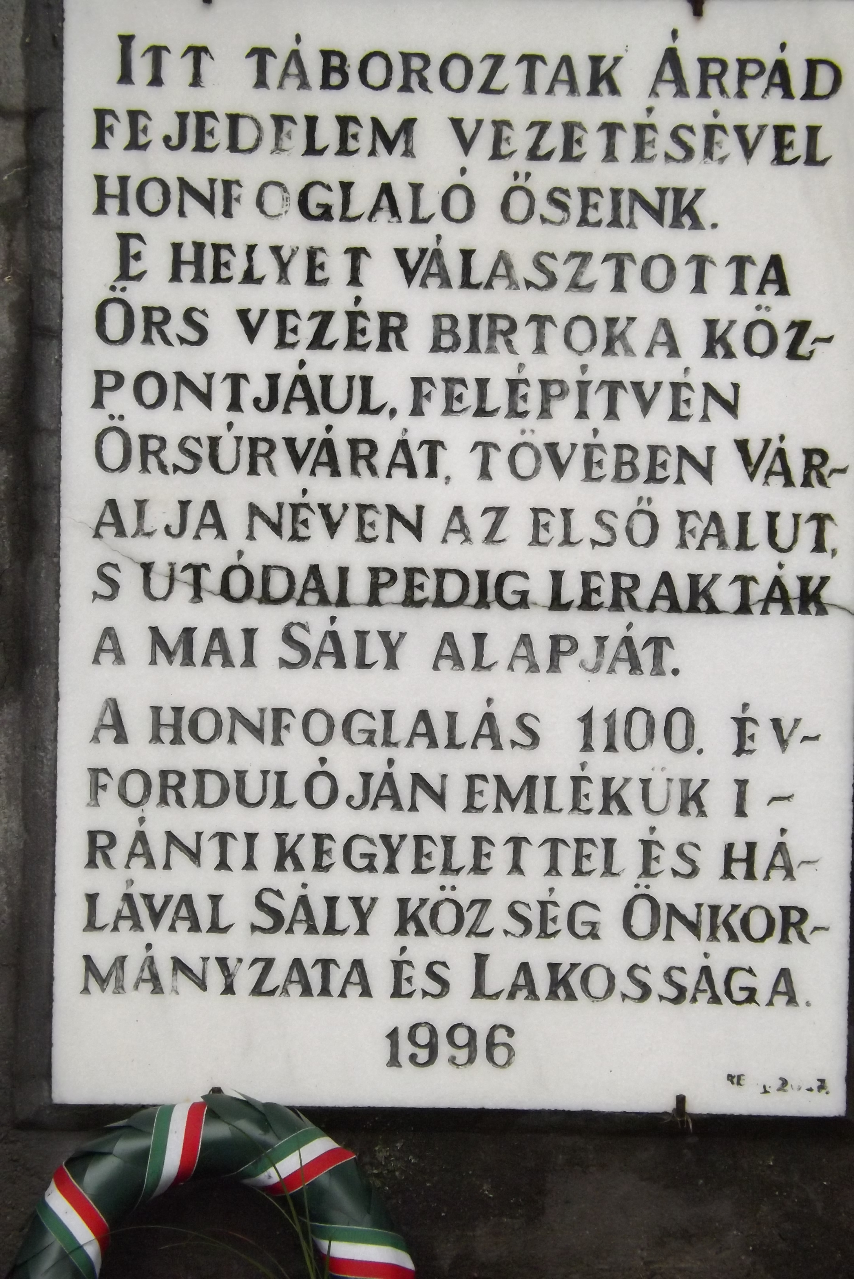 Örsúr emléktábla Latorpusztán